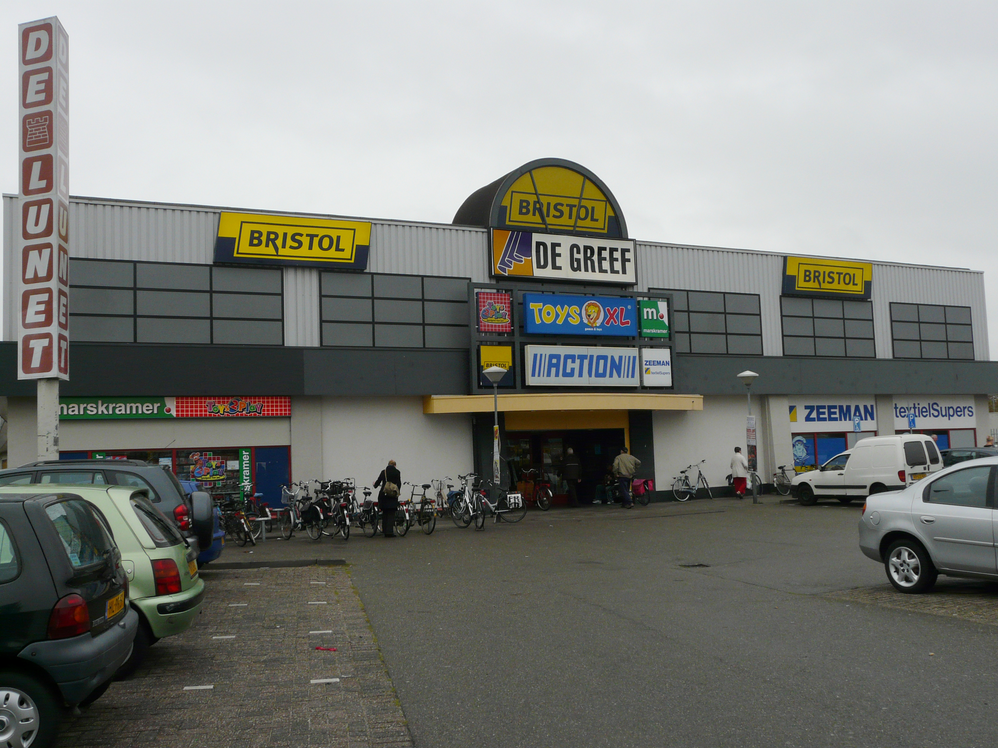 Voormalig winkelcentrum de Lunet in de wijk Tuinzigt in Breda